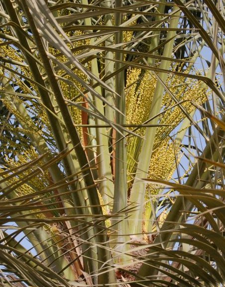 ഈന്തപ്പനയുടെ പൂവ്